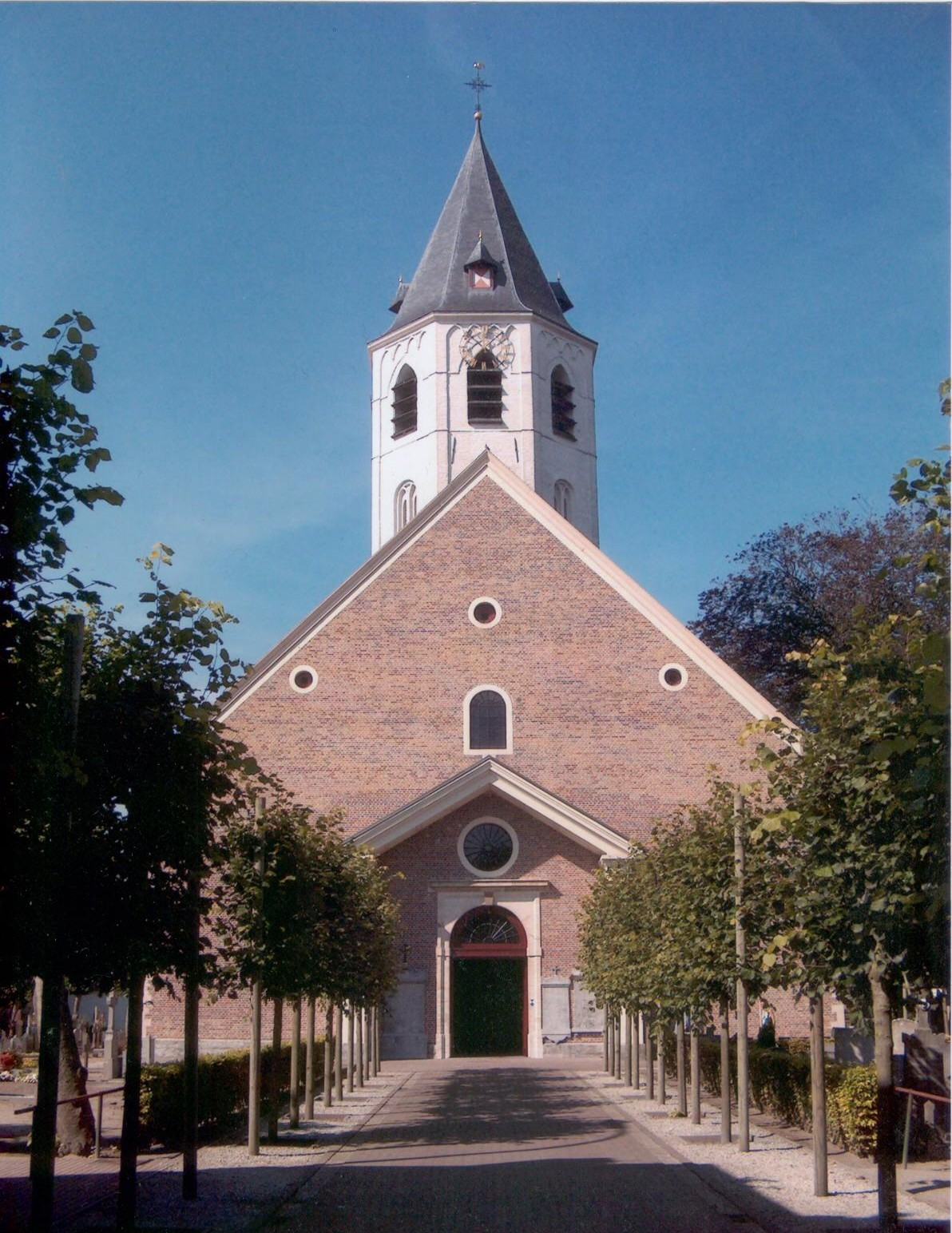 scan van eigen foto